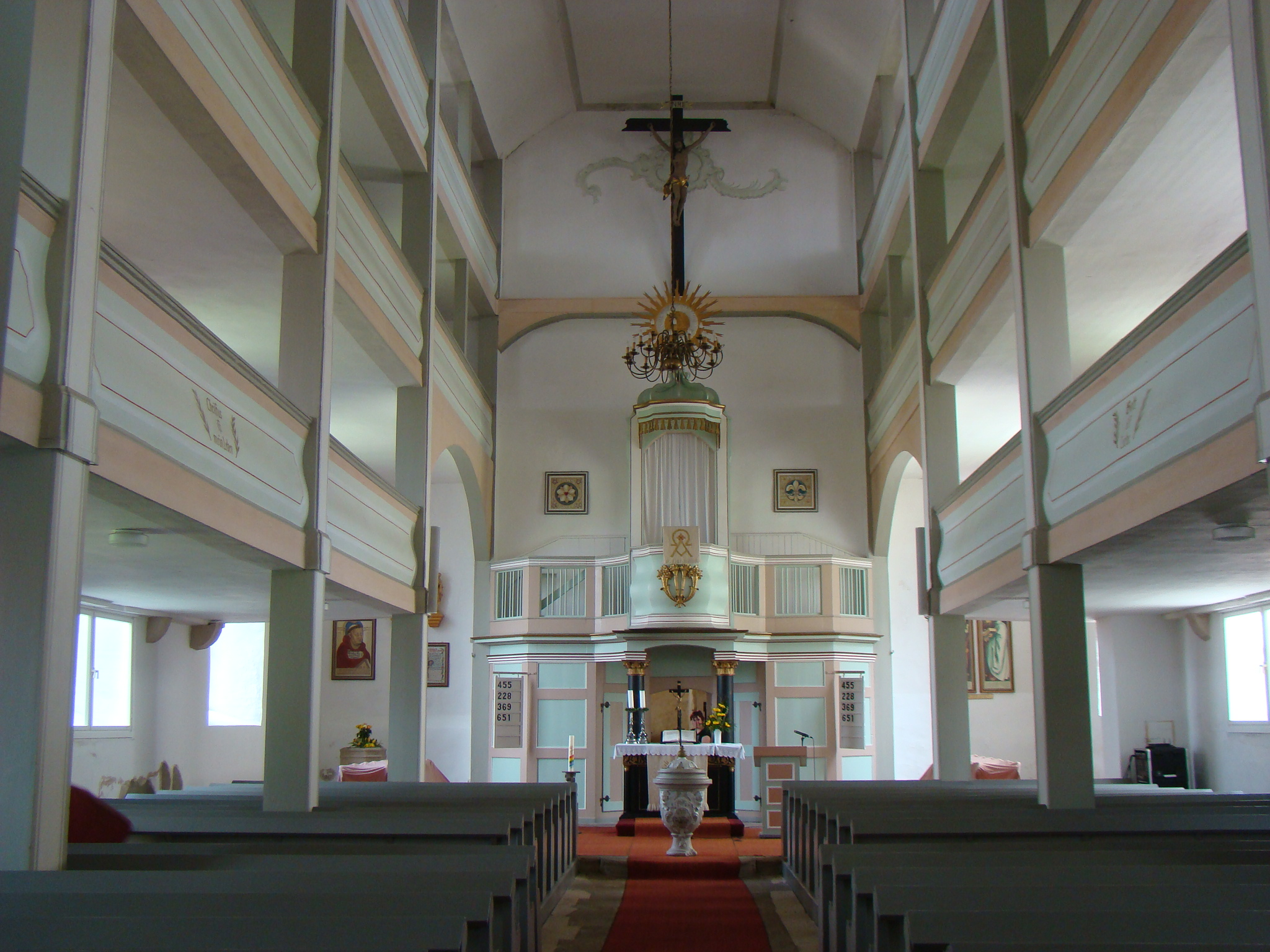 St. Marien (Crawinkel)